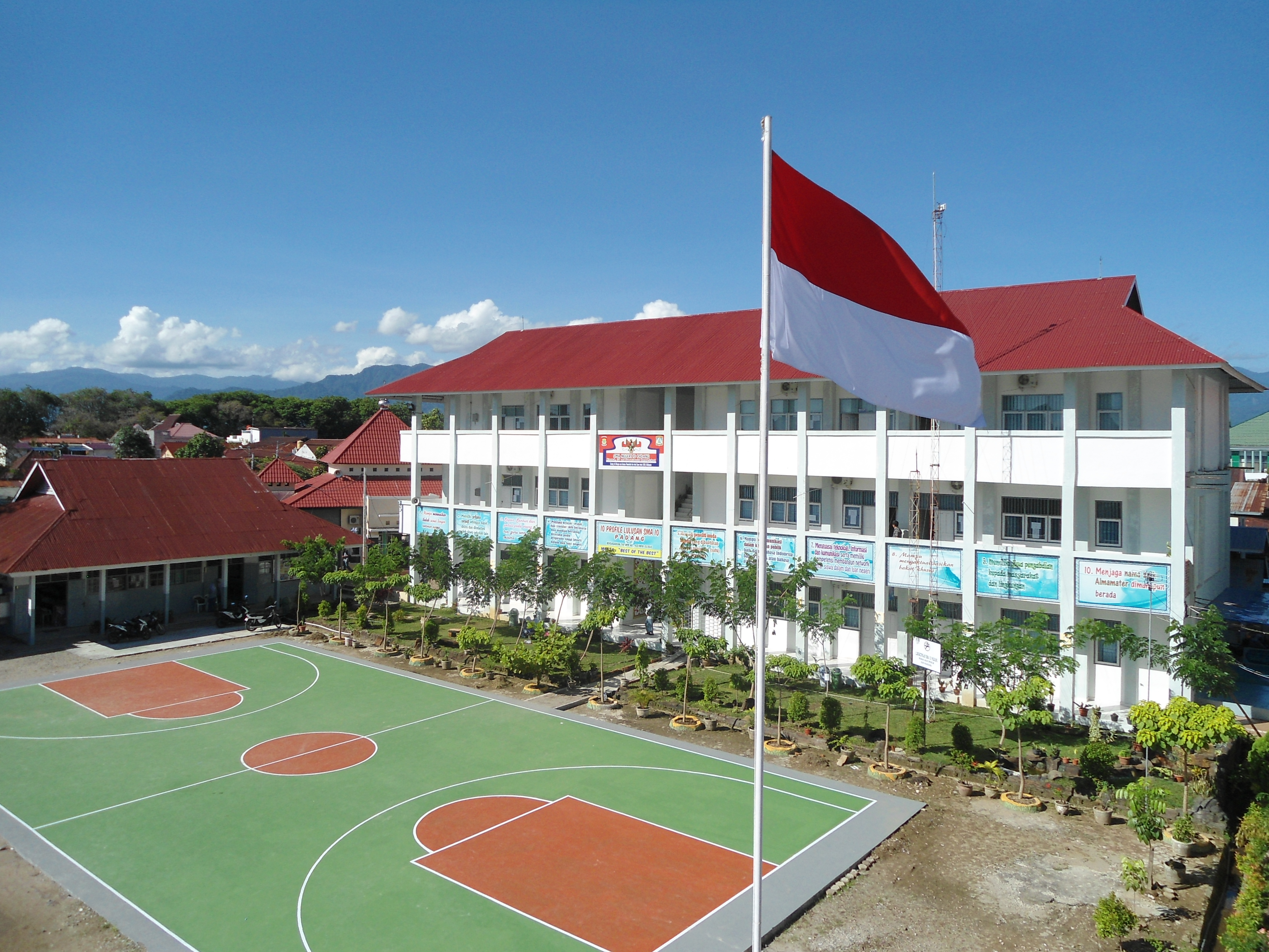 SMA Negeri 10 Padang